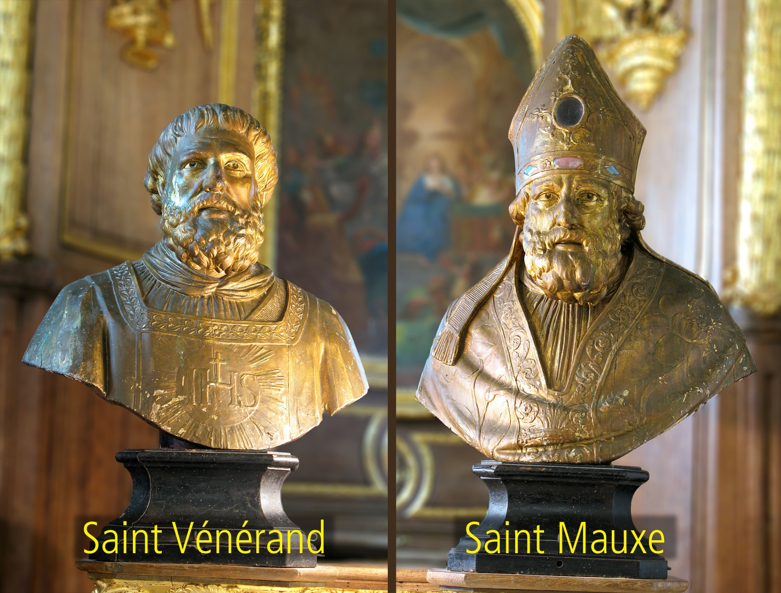 Bustes reliquaires de saint Mauxe et saint Vénérand. Ces bustes se trouvent de part et d'autre du maître-autel de l'église d'Acquigny (France - Normandie - Eure). Ce montage est destiné à un article de la page "Acquigny" de Wikipedia. Les images originales sont disponibles sous les noms Acquigny - Buste S Mauxe.jpg et Acquigny - Buste S Vénérand.jpg.